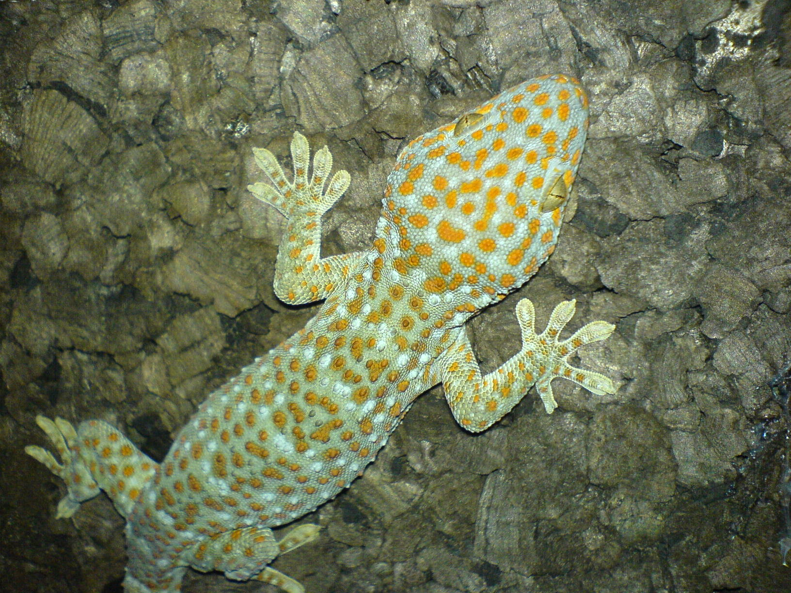 Gekko gecko